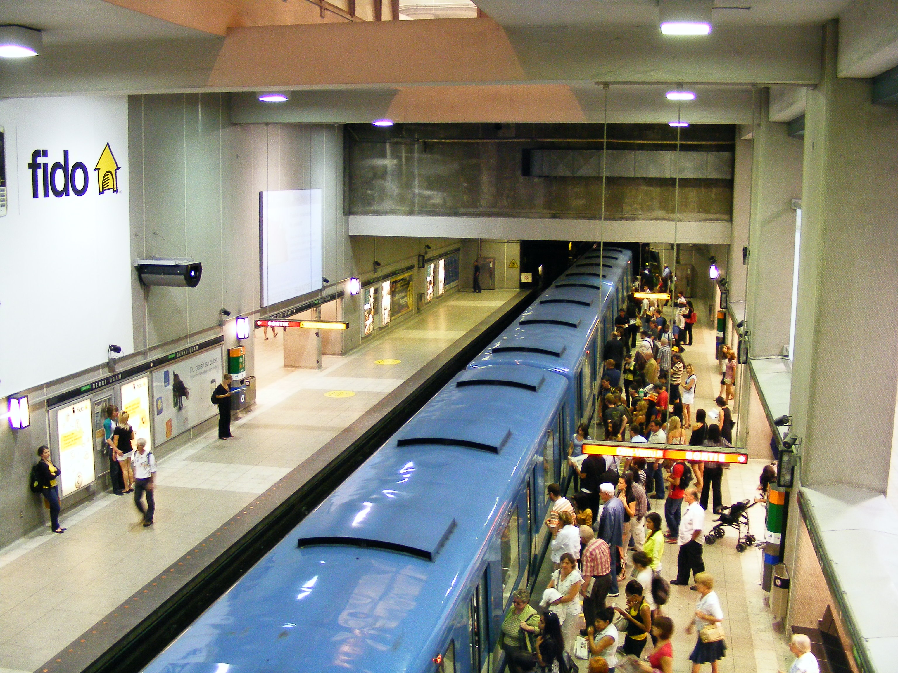 Montréal